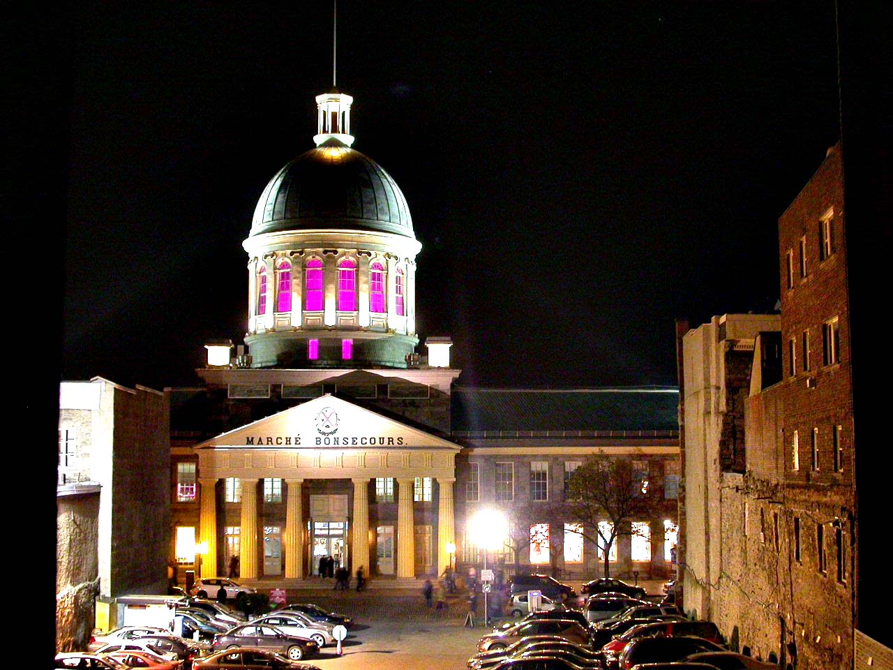 Montréal, Vieux-Montréal, Marché Bonsecours